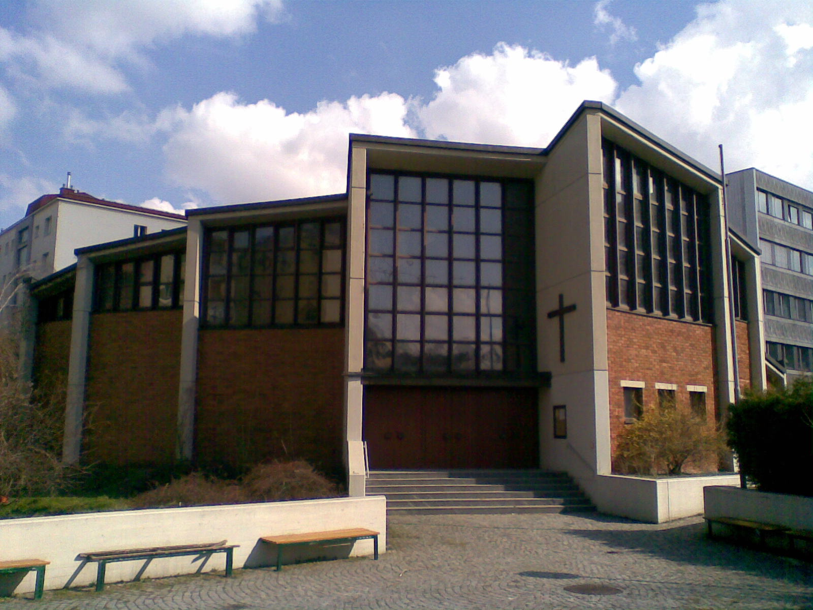 Erlöserkirche